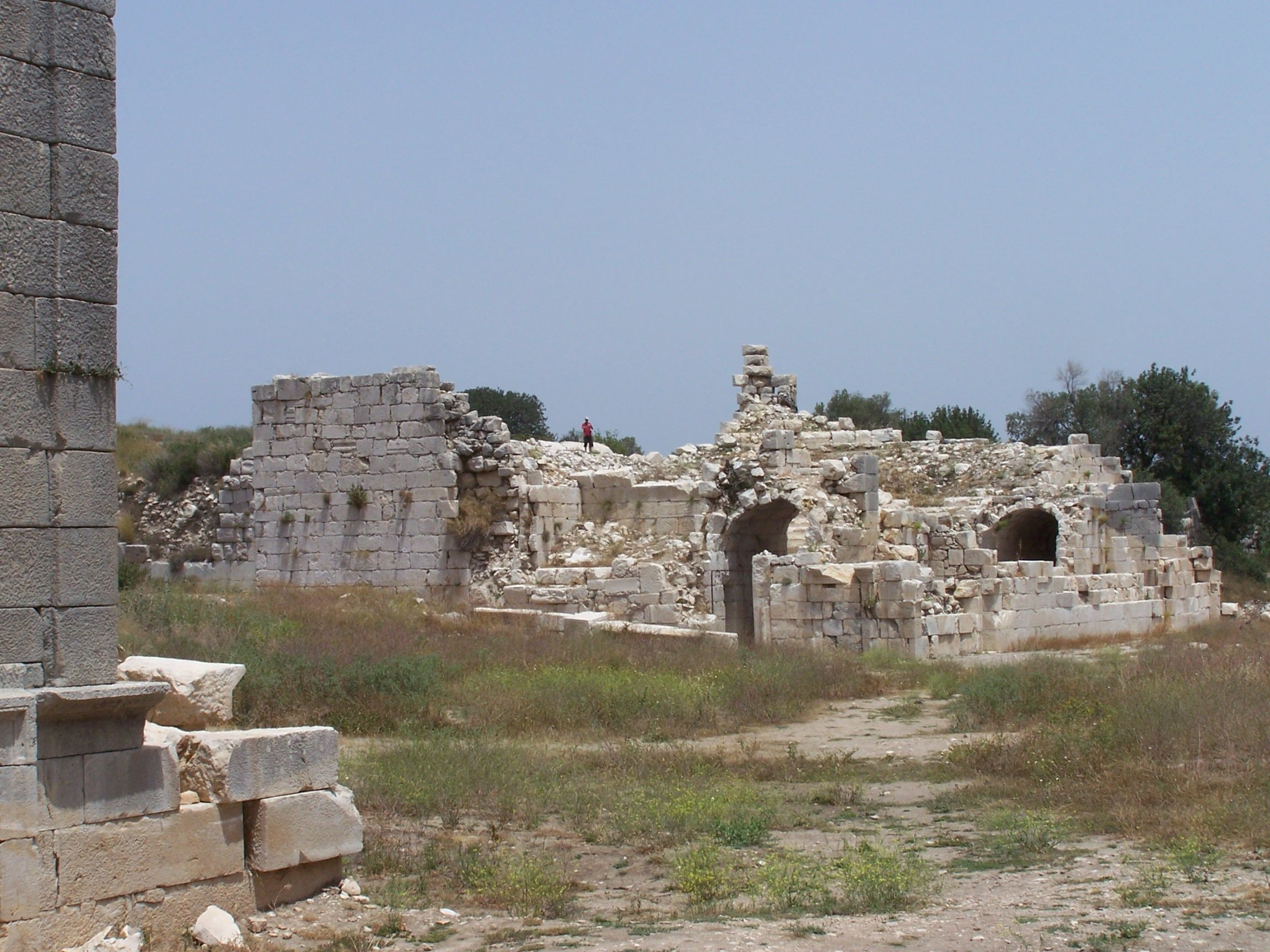 Das kleine Theater von Patara